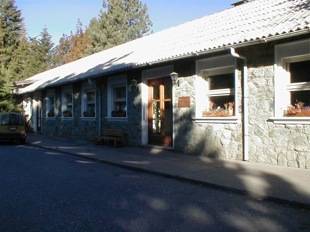 Pabellón de Aulas "Guido Beck" del Instituto Balseiro.